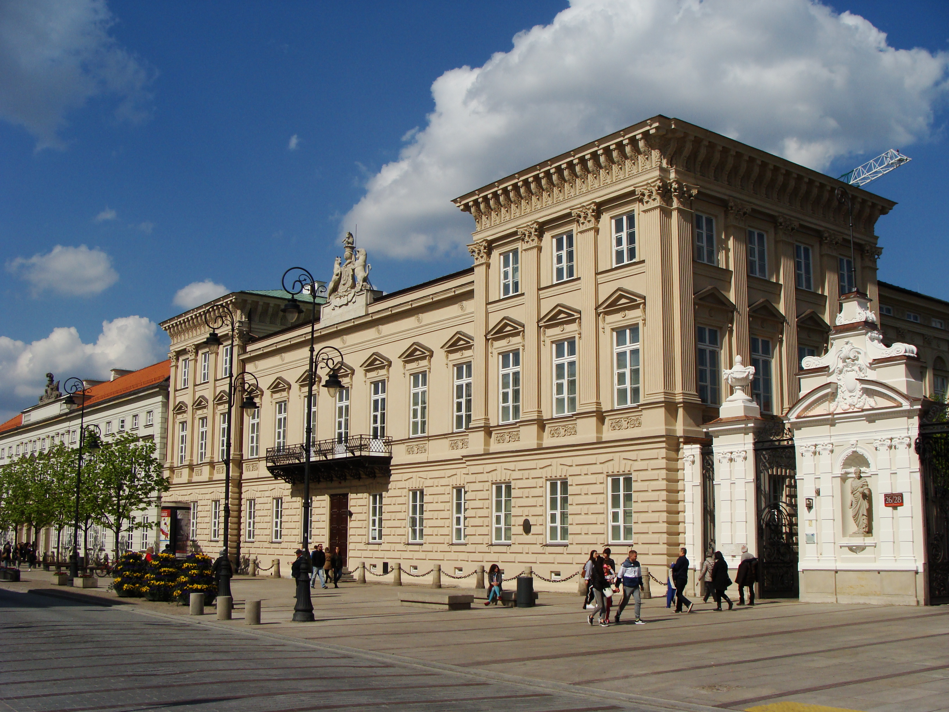 Pałac Uruskich- Czetwertyńskich w Warszawie